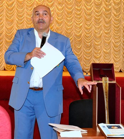 Сергій Савелій з нагородою AIPS у Будинку культури Гребінки